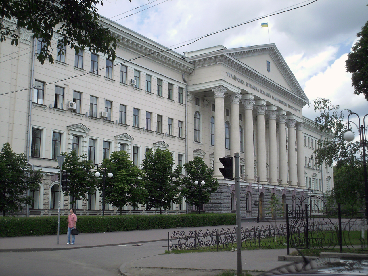 описание